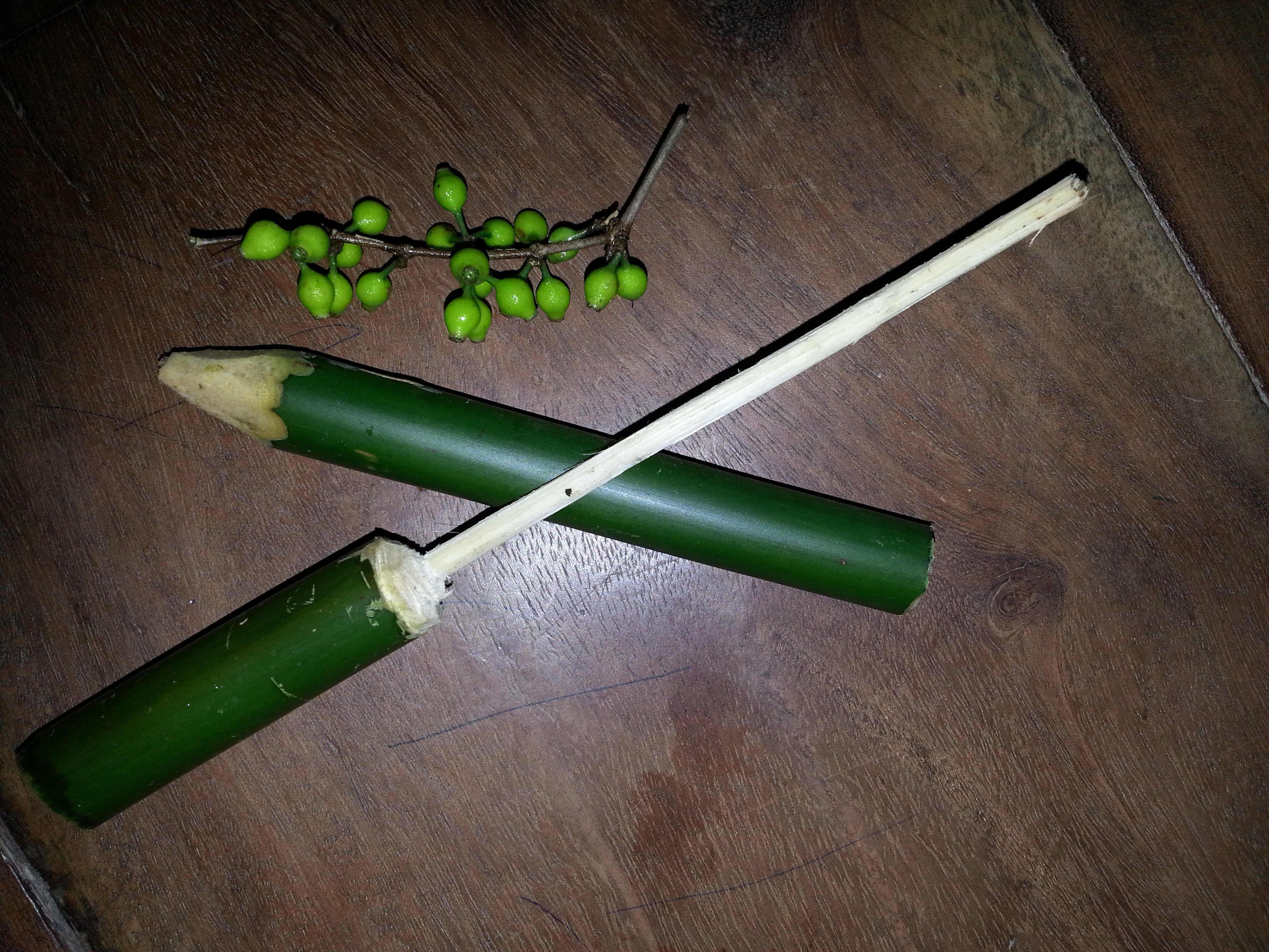 ചെറിയ മുളകൊണ്ട്‌ ഉണ്ടാക്കിയ കളികോപ്പ്‌. ഇതിന്റെ ഒരറ്റത്തെ ദ്വാരത്തിൽ കൊട്ടക്കായ/കായാവിൽ കായ വെച്ചിട്ട്‌ കോലു കൊണ്ട്‌ തള്ളുമ്പോൾ ശബ്ദമുണ്ടാകുന്നു.